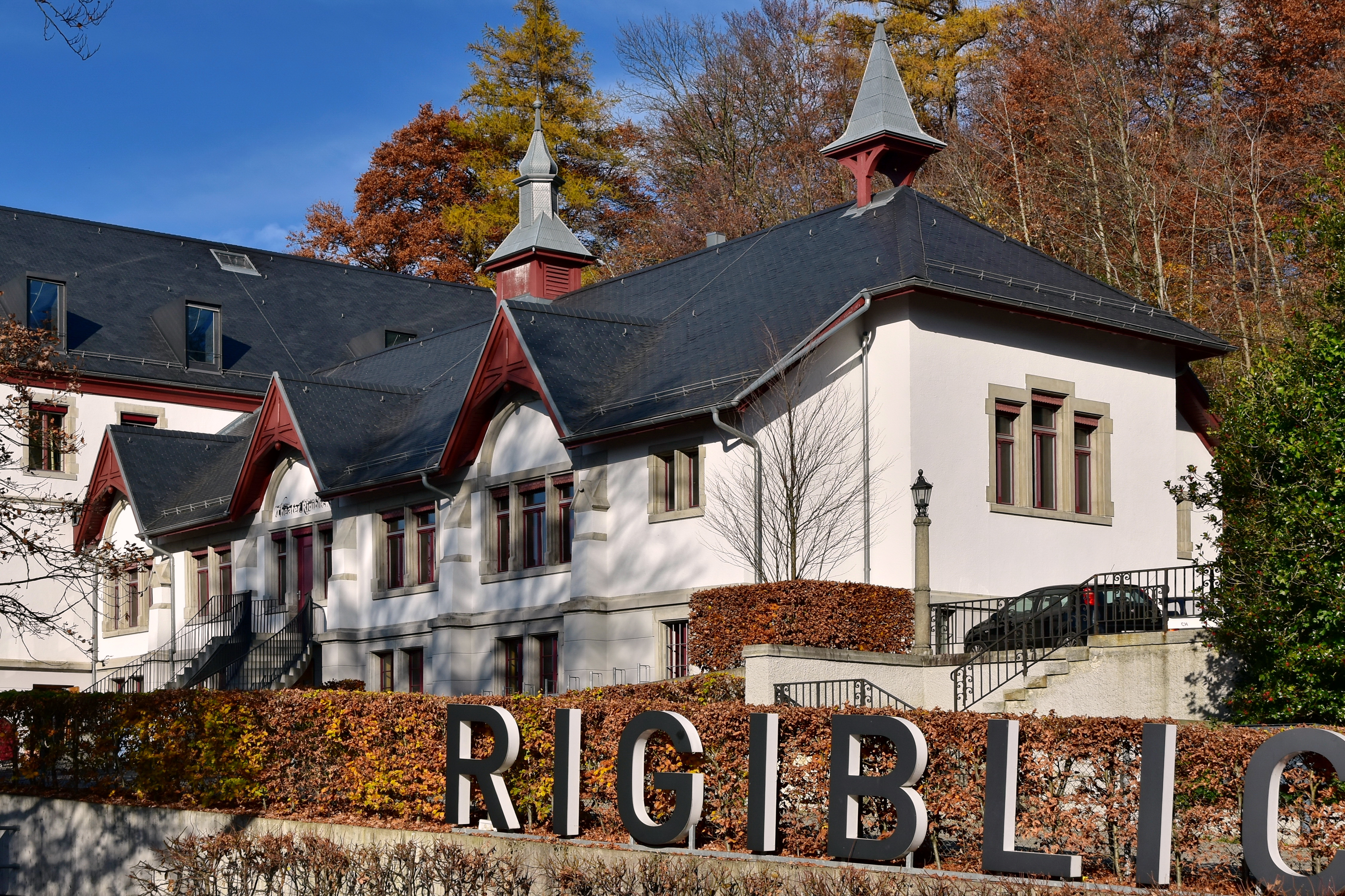 Theater Rigiblick, ZVU Rigiblick in Zürich (Switzerland)